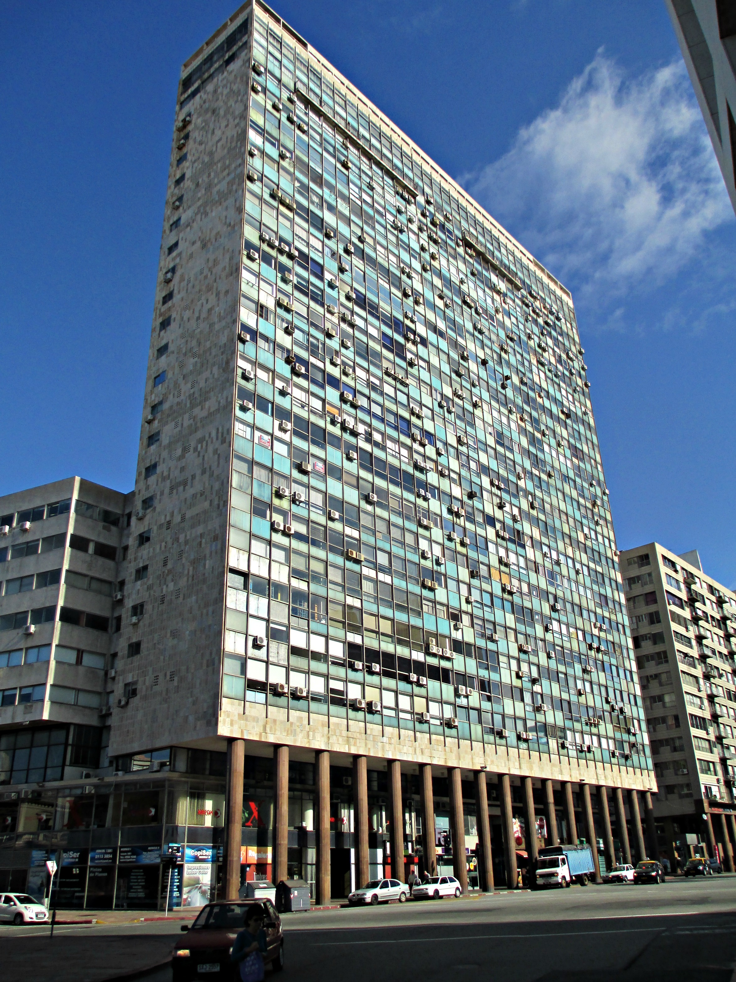 Edificio Ciudadela en la ciudad de Montevideo, Uruguay.